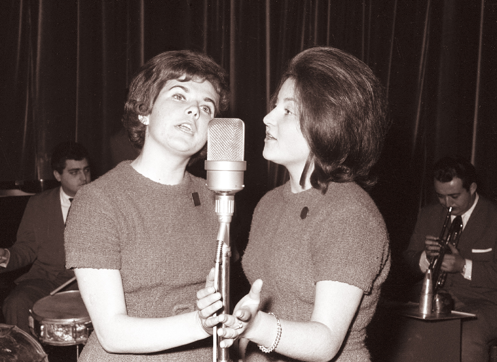 Koncert v Mariboru - Duo Hani